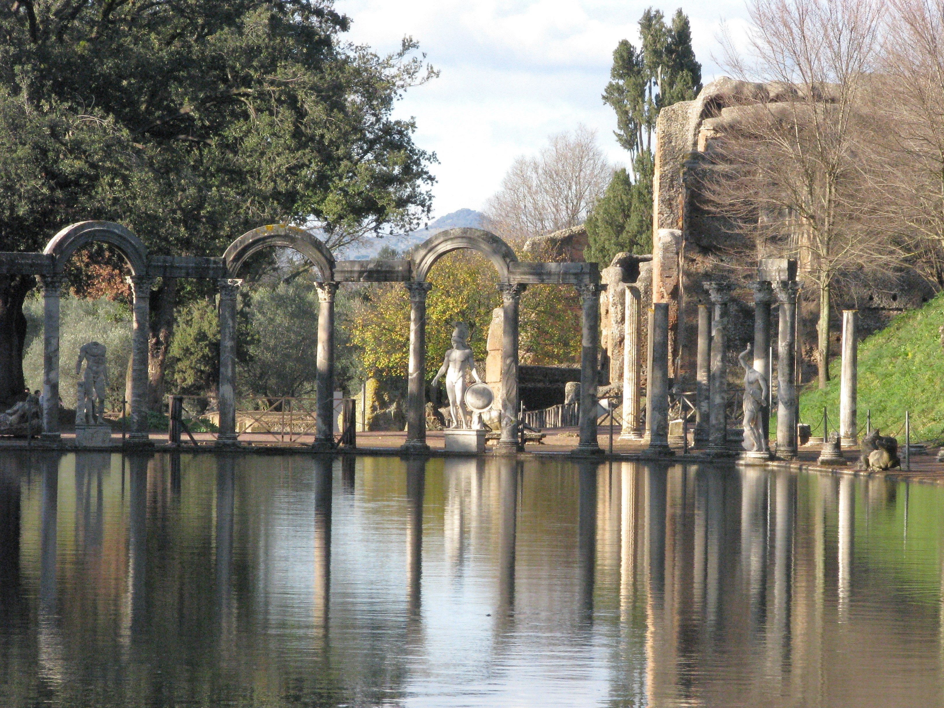 Tivoli, Villa Adriana, Canopus